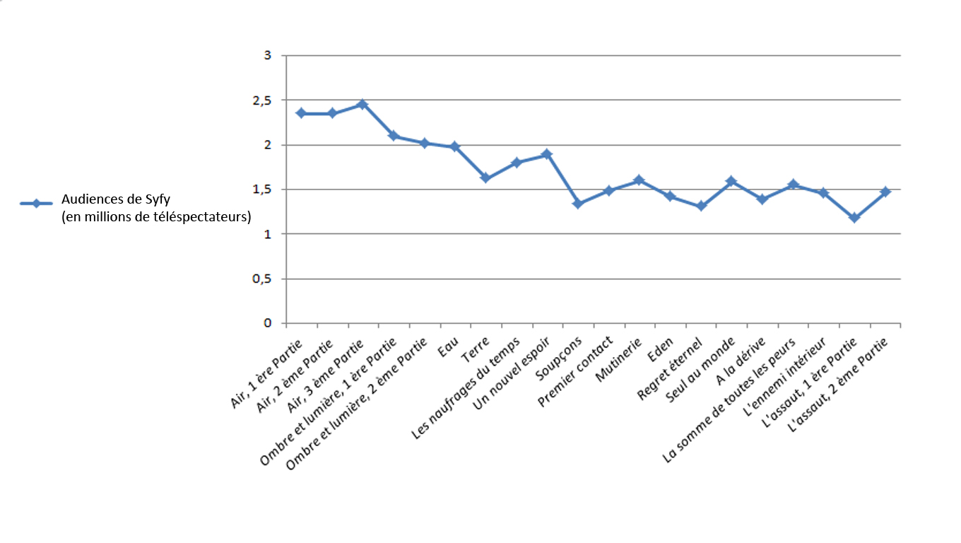 Courbe des audiences de la saison 1 de Stargate Universe aux États-Unis sur Syfy